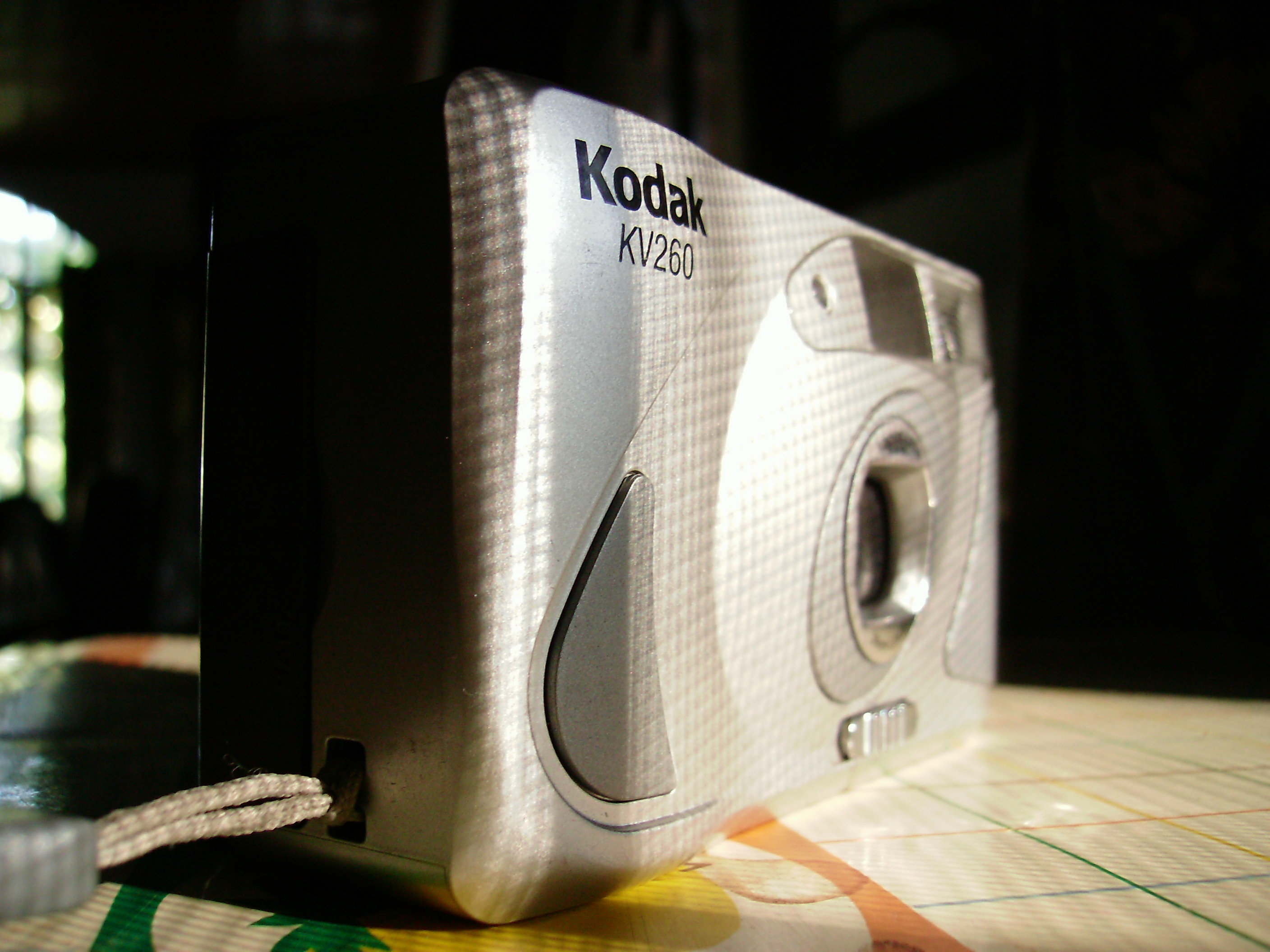 Cámara compacta de 35mm Kodak.